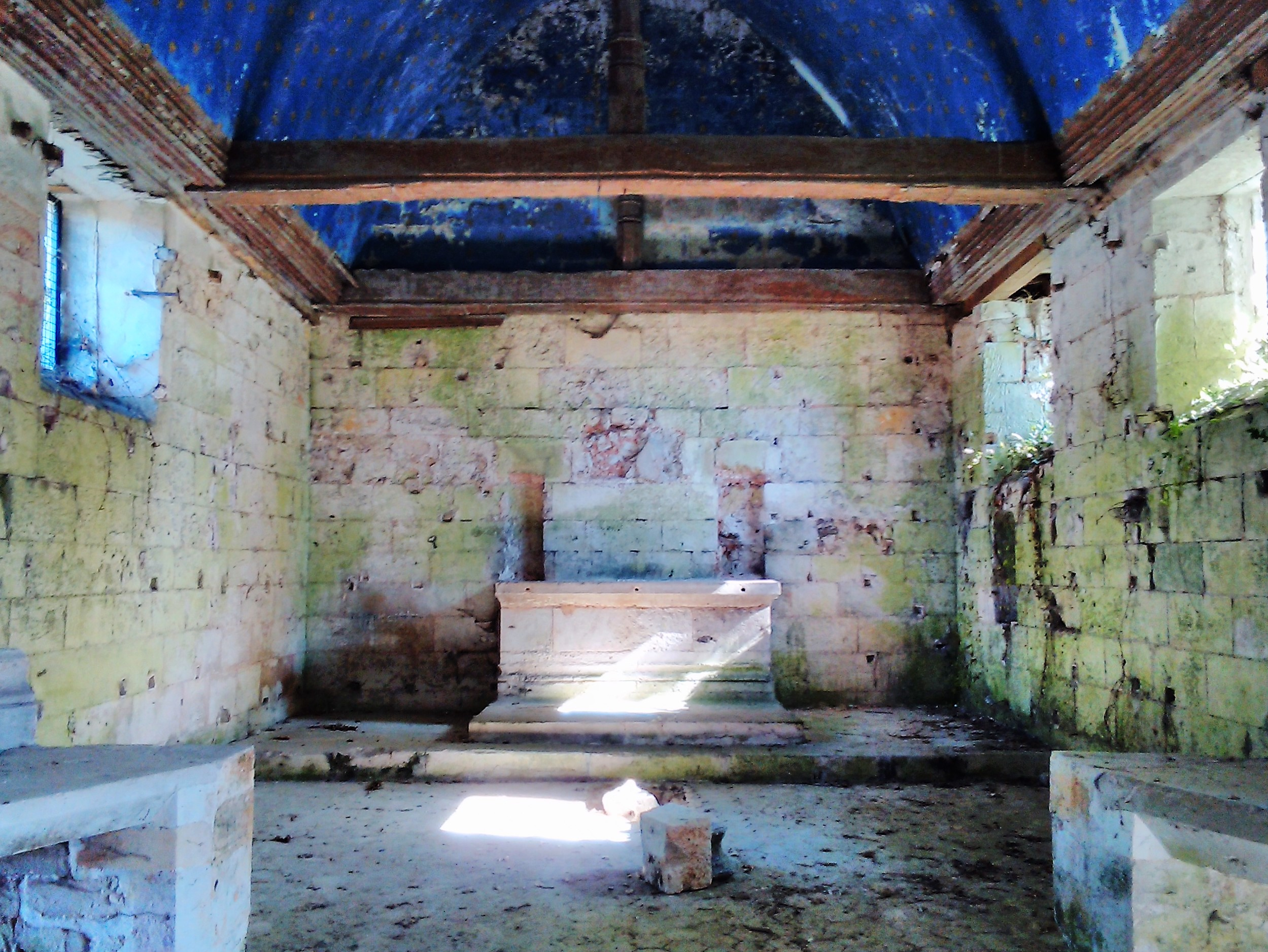 L'ancienne église Saint-Martin, à Vézillon dans l'Eure.